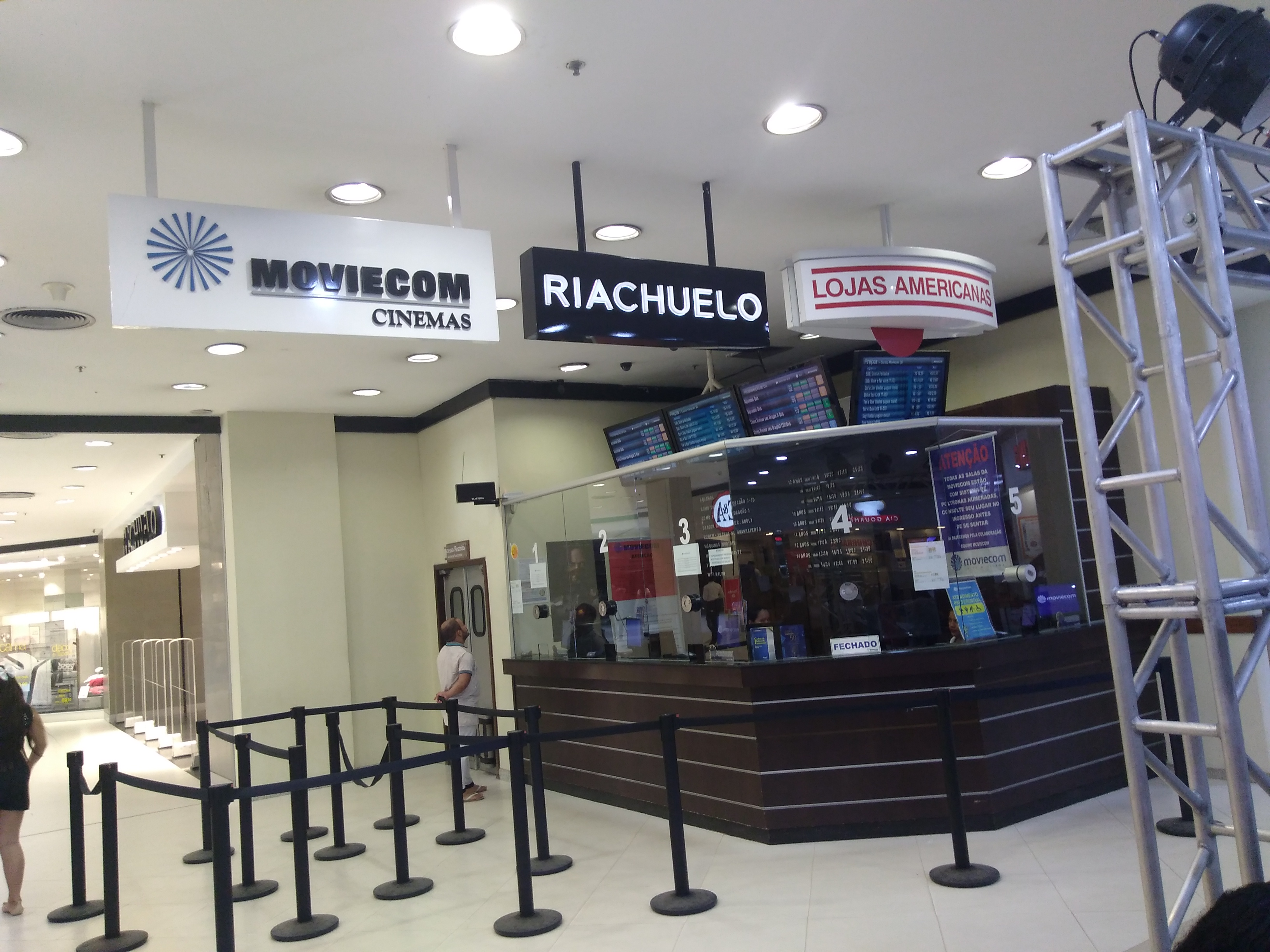 Bilheteria do cinema Moviecom Shopping Castanheira